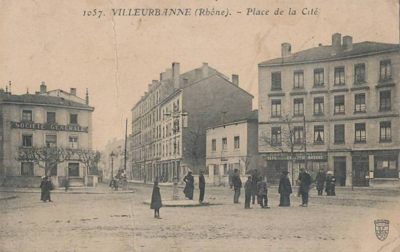 Carte postale - Villeurbanne - Place de la Cité, actuel Totem.